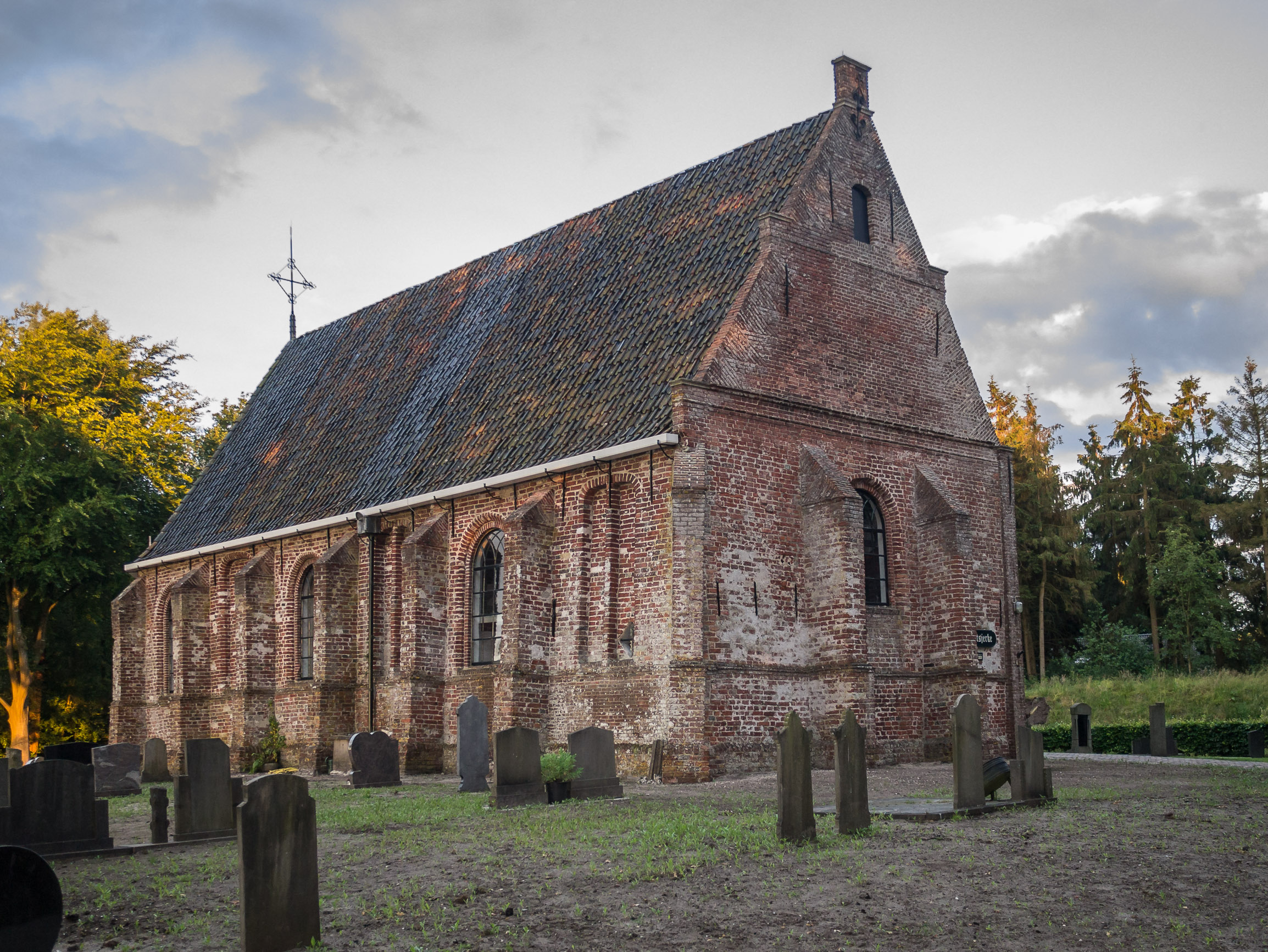 Thomaskerk, Katlijk